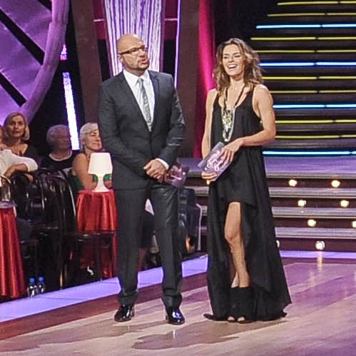 Polska edycja programu "Taniec z gwiazdami" - XIII edycja, odcinek 1 z 14.09.2011, emitowana w telewizji TVN.